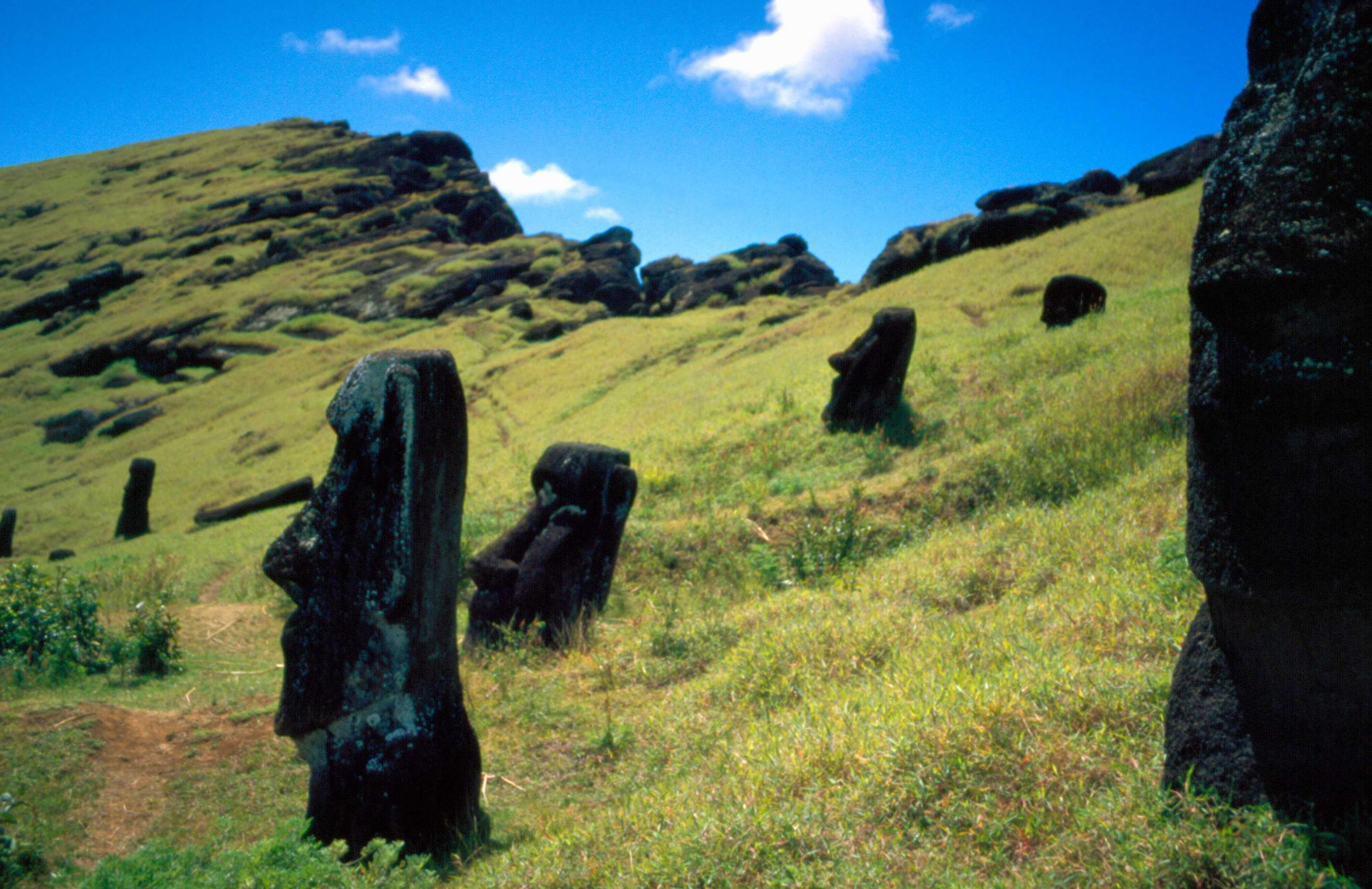 Moais am Kraterrand des Rano Raraku, Osterinsel